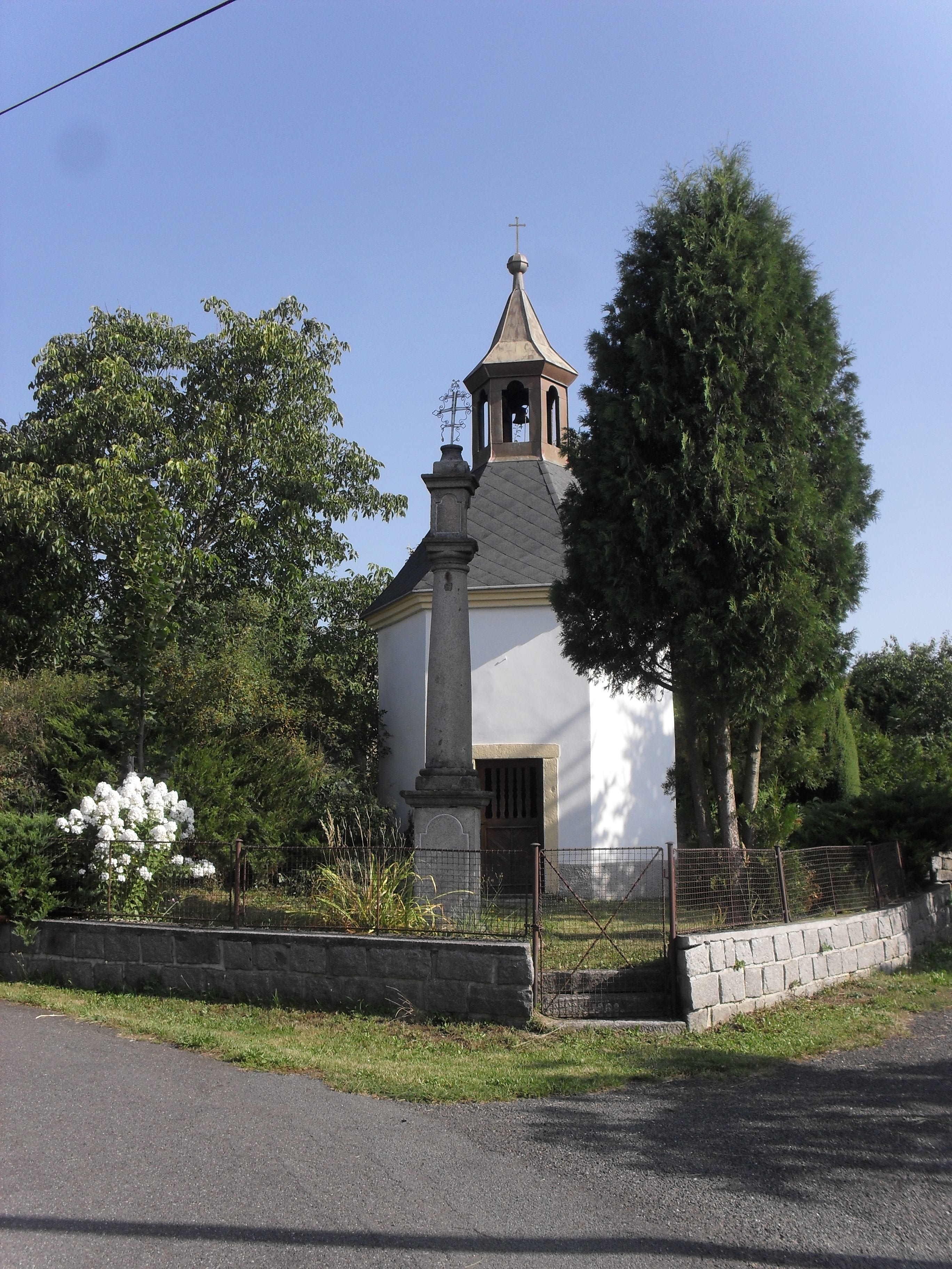 Fotografie pořízena v obci Maňovice.